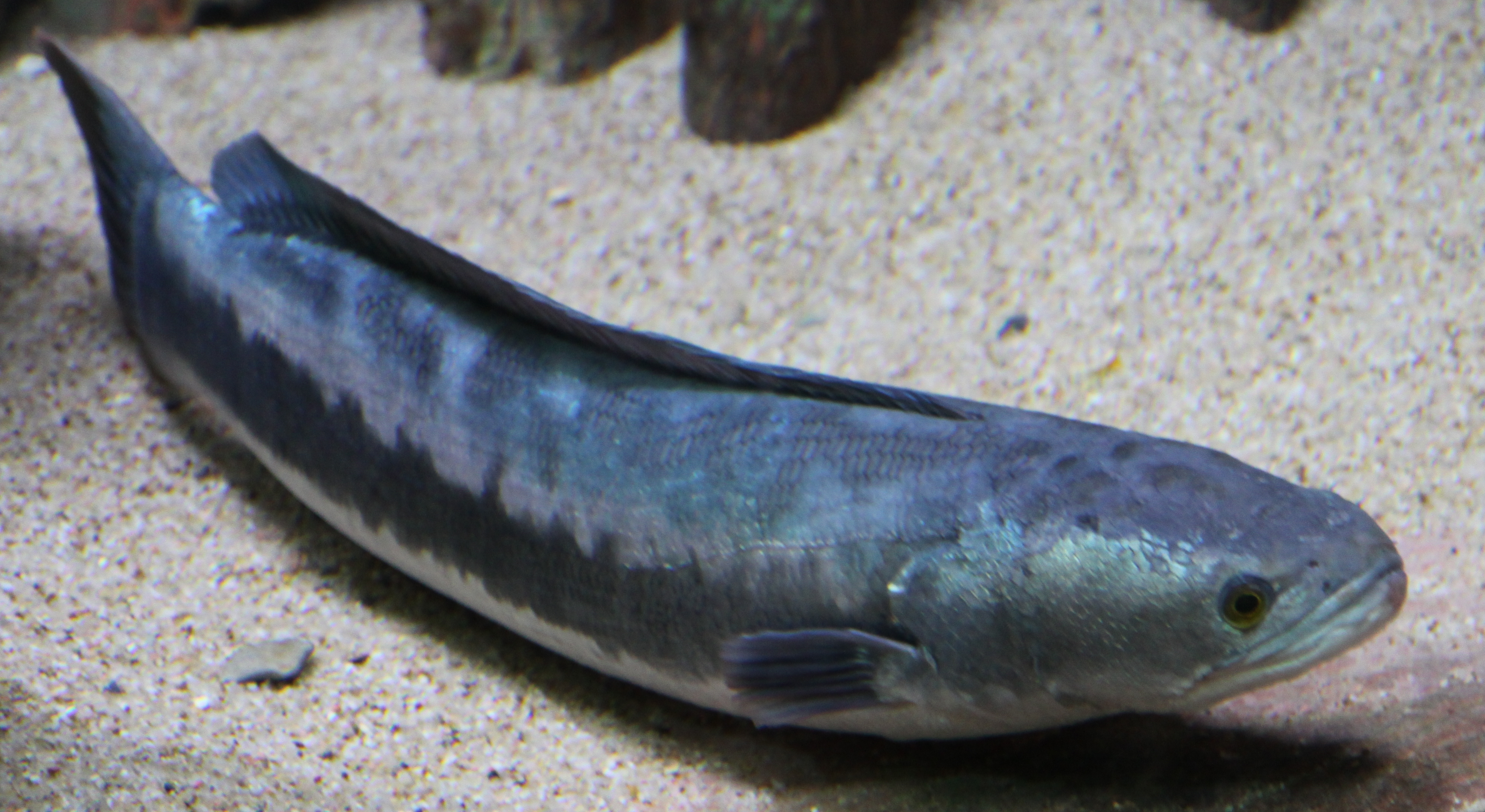 Tête de serpent à l'aquarium tropical de la porte dorée à Paris.